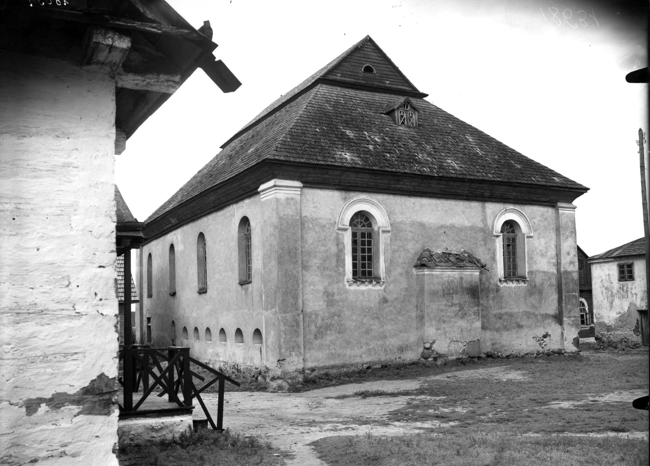 Беларуская (тарашкевіца): Дзярэчын (Dziarečyn). Сынагога